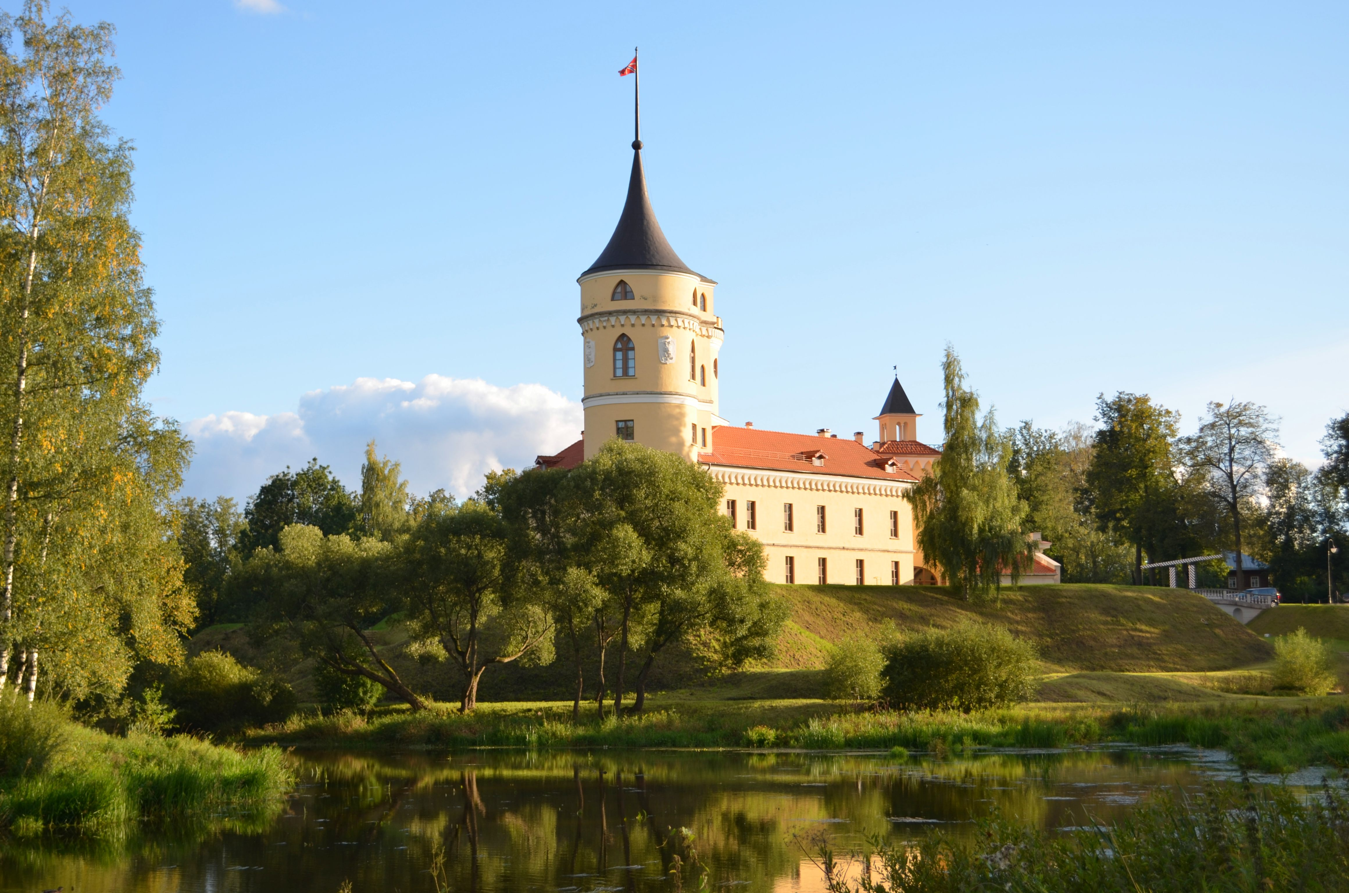 крепость "Бип" ("Мариенталь") Бастион Императора Павла